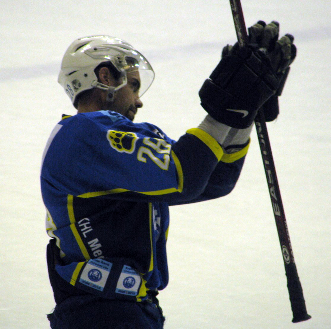 Alan Letang